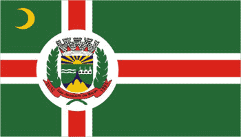 Bandeira do município de São Joaquim de Bicas, Minas Gerais, Brasil.